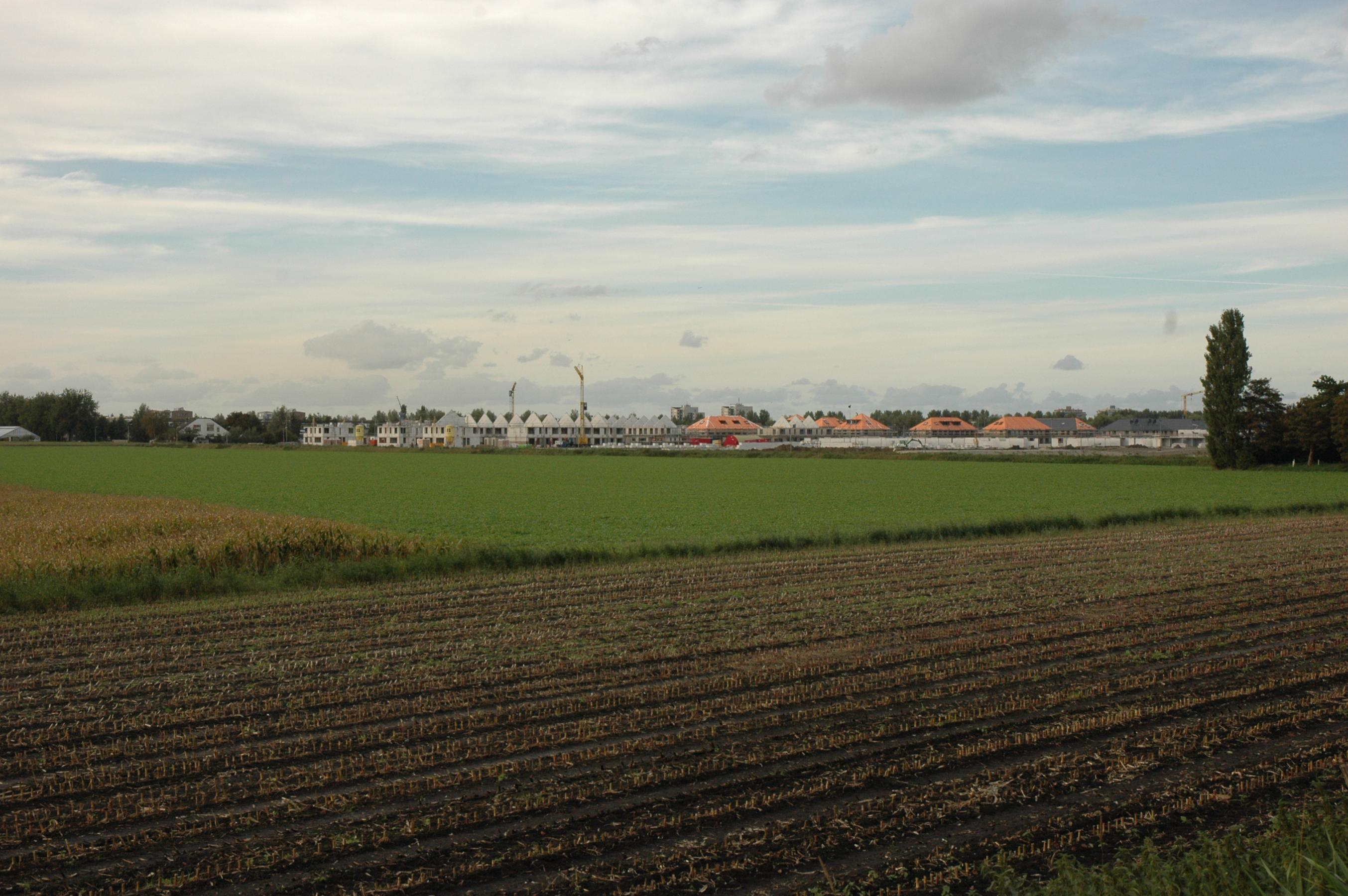 Bouw Westwijk (2007)